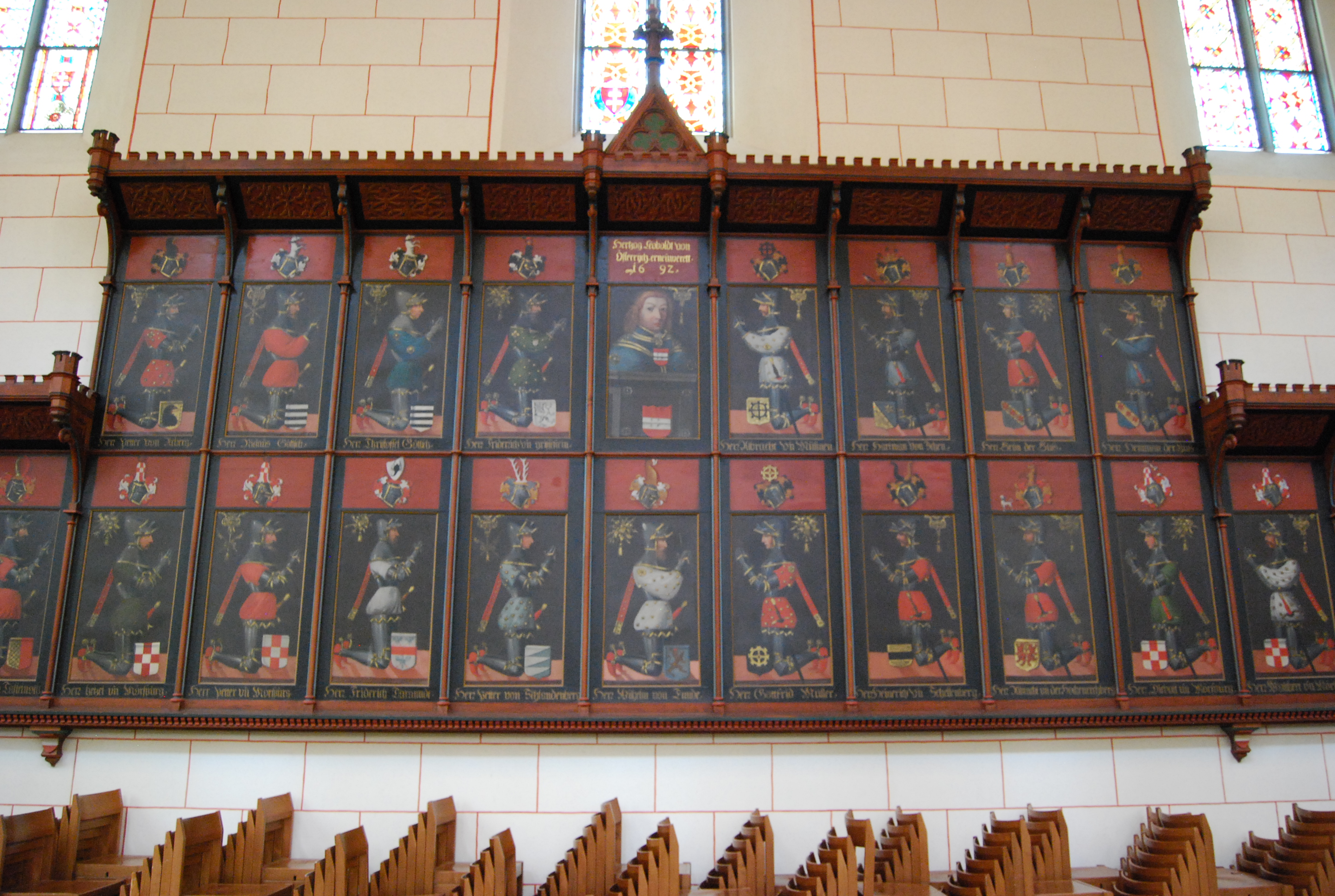 Seitenaltar in der Klosterkirche Königsfelden. Der Altar wurde vermutlich 1692 von einem unbekannten Künstler erstellt.